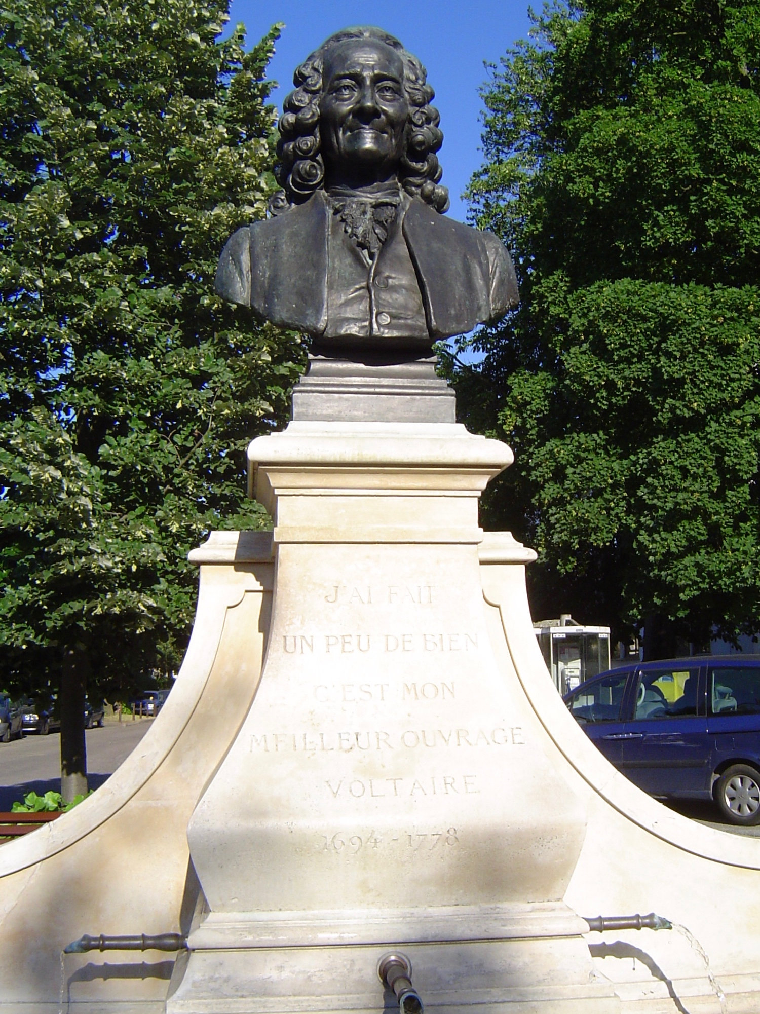 Statue de Voltaire